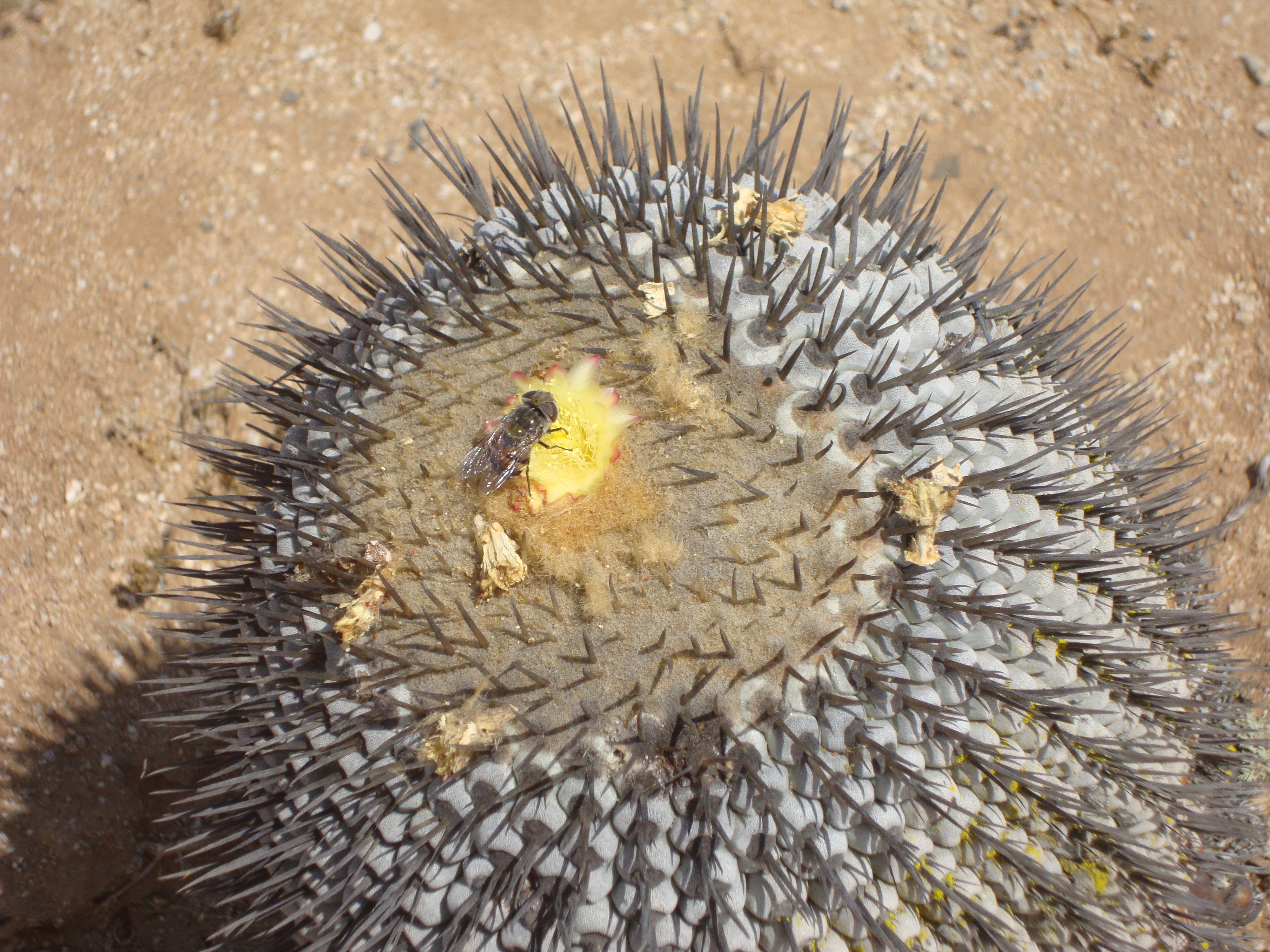 pan de azúcar